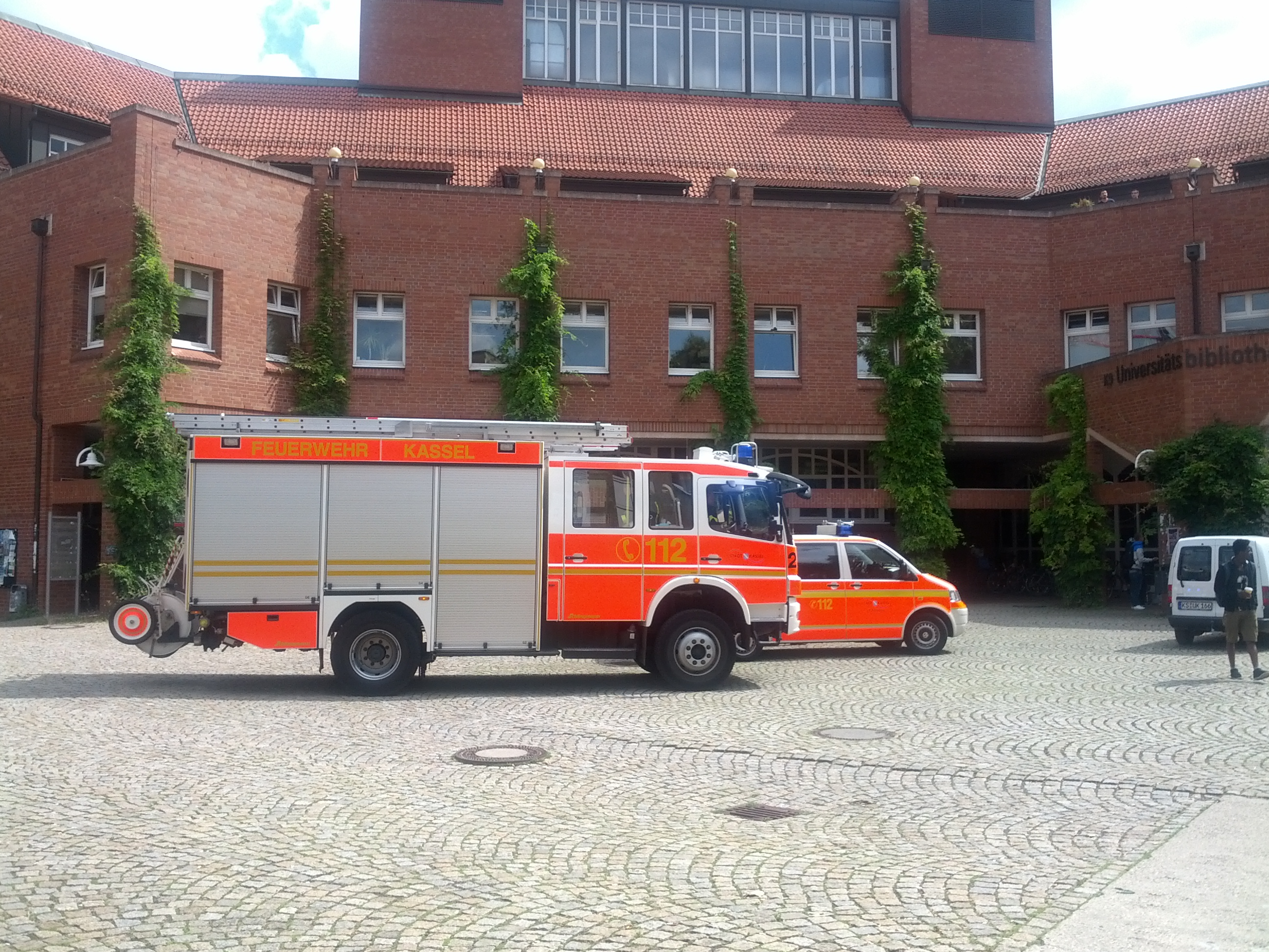 Feuerwehreinsatz auf dem Campus der Universität Kassel am 14. August 2013.